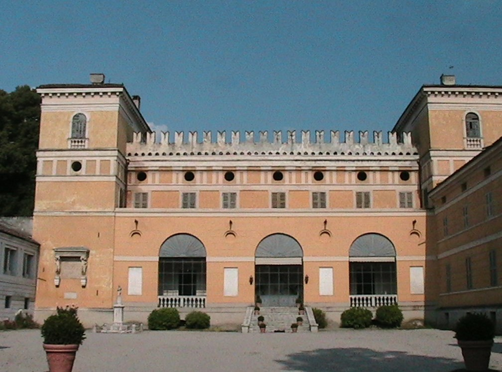 Torre de' Picenardi - Villa Sommi Picenardi